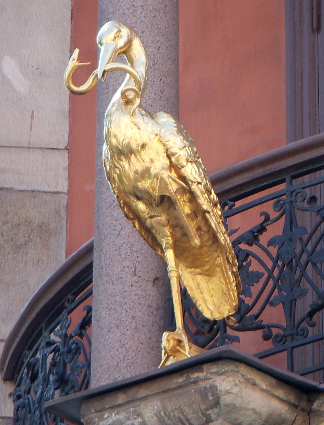 Apoteket Storken på Östermalm, Stockholm, Storken med ormen